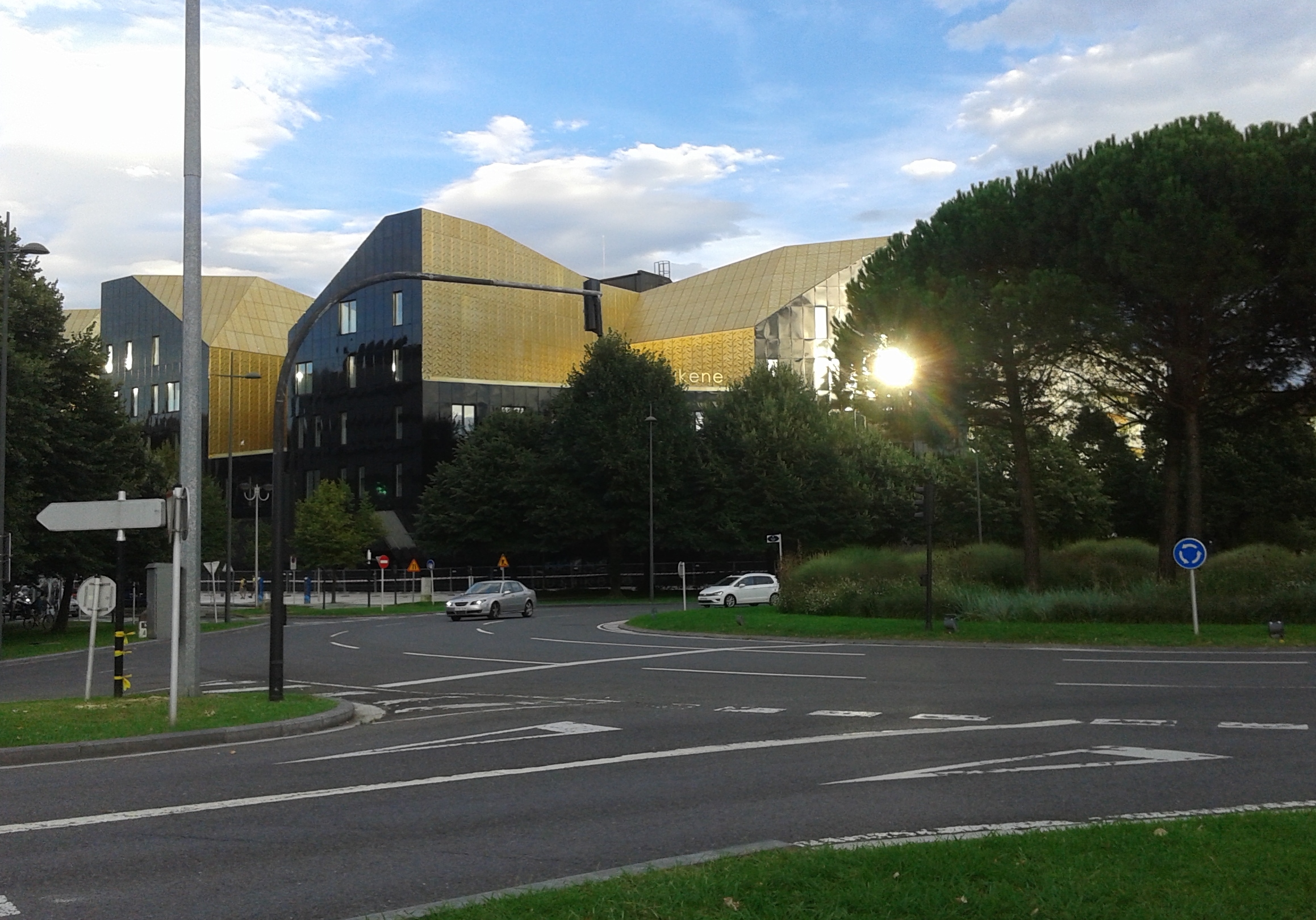 Musikene, Goi Mailako Musika Eskola.